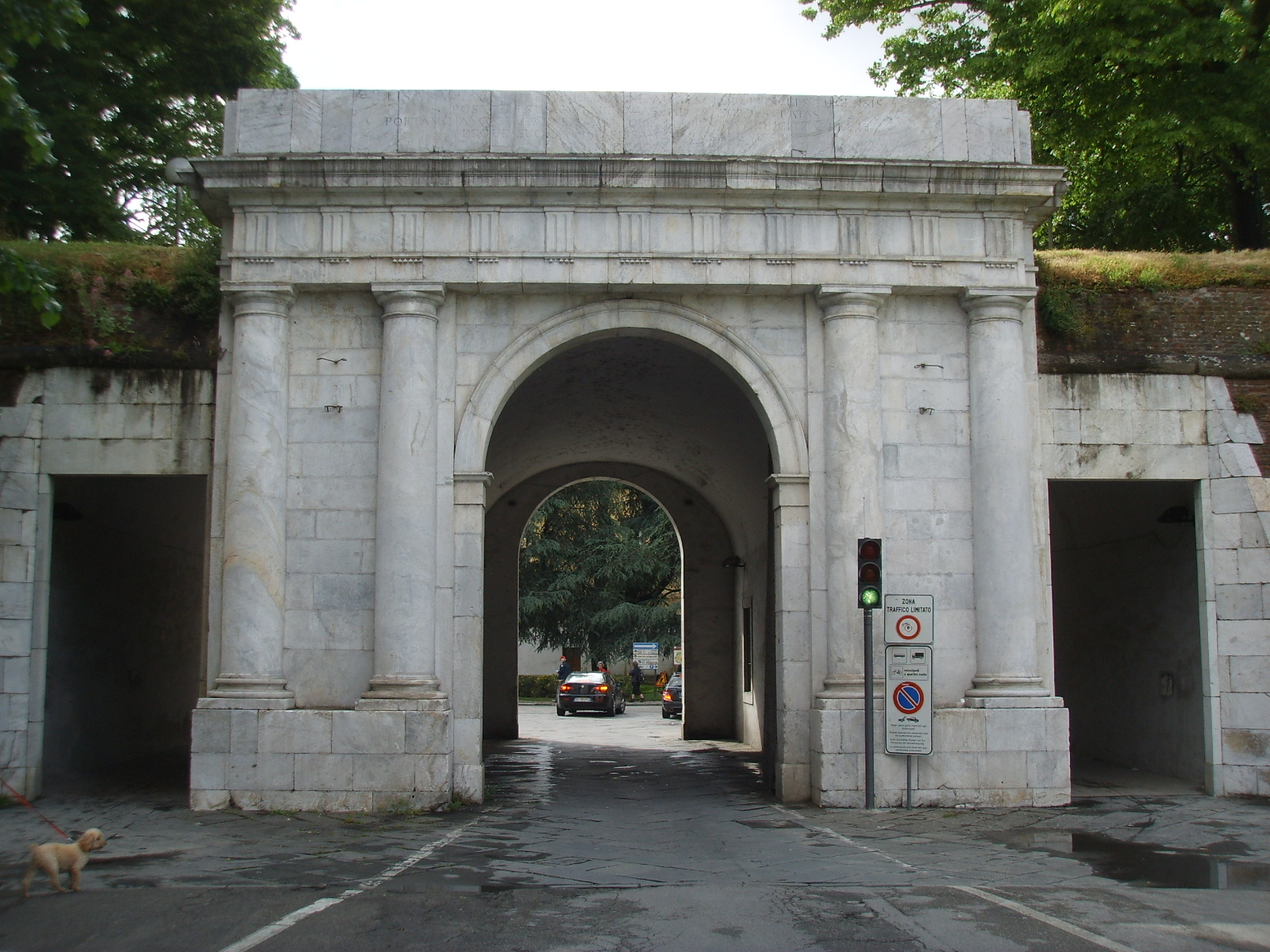 Porta elisa 01